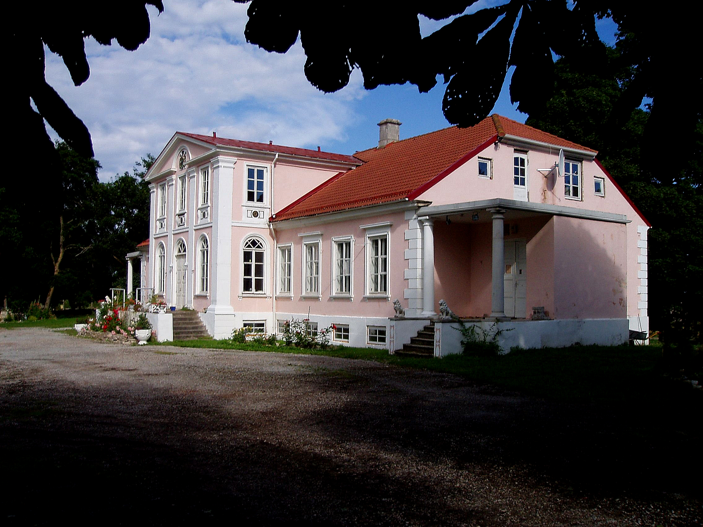 Oti mõisa peahoone 2005. aastal